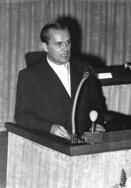 Illus/Quaschinsky 1.11.51 13. und 14. Sitzung der Volkskammer Die Volkskammer der DDR trat am 31.10.51 und 1.11.51 zu ihrer 13. und 14. Sitzung zusammen, um u.a. über das "Gesetz über den Fünfjahresplan zur Entwicklung der Volkswirtschaft der Deutschen Demokratischen Republik", den Rechenschaftsbericht der Regierung über die Einnahmen der Republik und ihre Verwendung für das Rechnungsjahr 1950" und das "Gesetz über die Deutsche Notenbank" zu beraten. UBz: Für die Genossenschaften sprach der Abgeordnete Lucht.